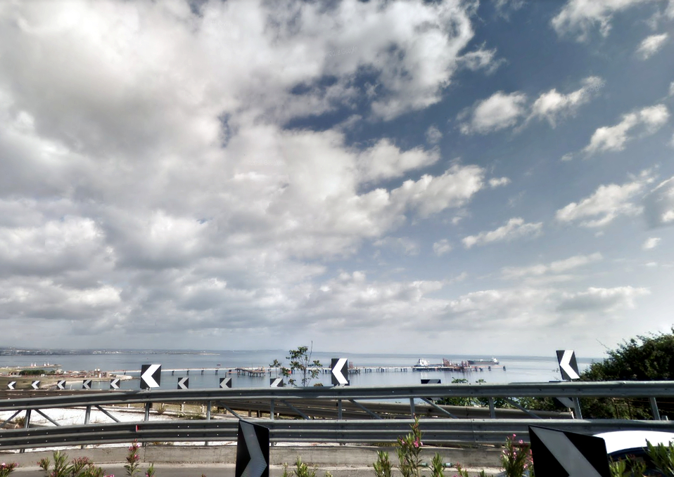 Cavalcavia Targia- Siracusa Nord